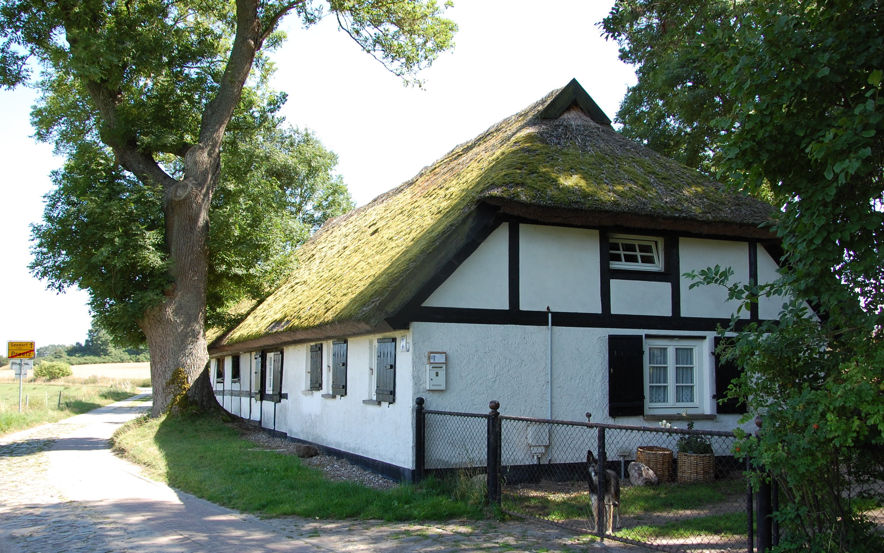 Preetz Haus Nummer 5